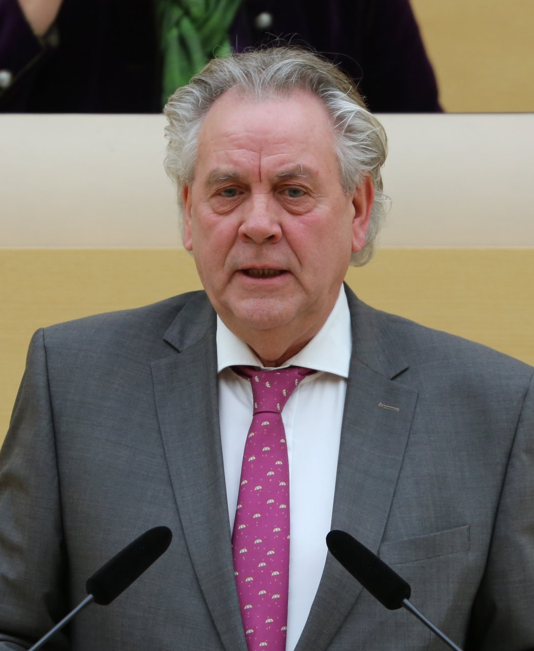 Albert Duin, deutscher Unternehmer und Politiker (FDP) ... er war von November 2013 bis November 2017 Landesvorsitzender der FDP Bayern und wurde im Oktober 2018 in den Bayerischen Landtag gewählt. Hier am 21. Februar 2019 während der 'Aktuellen Stunde' im Bayerischen Landtag. Titel des Werks: "Albert Duin (FDP) - 02/2019"